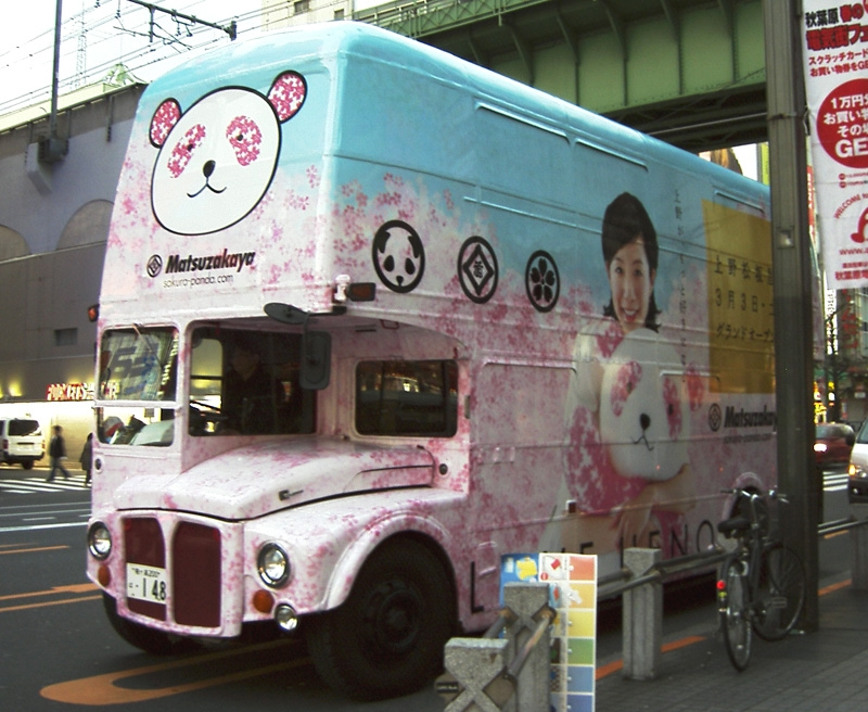 Matsuzakaya_bus Tokyo Japan